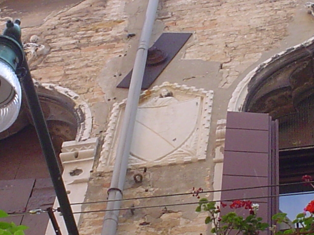 Stemma di casa Sanudo